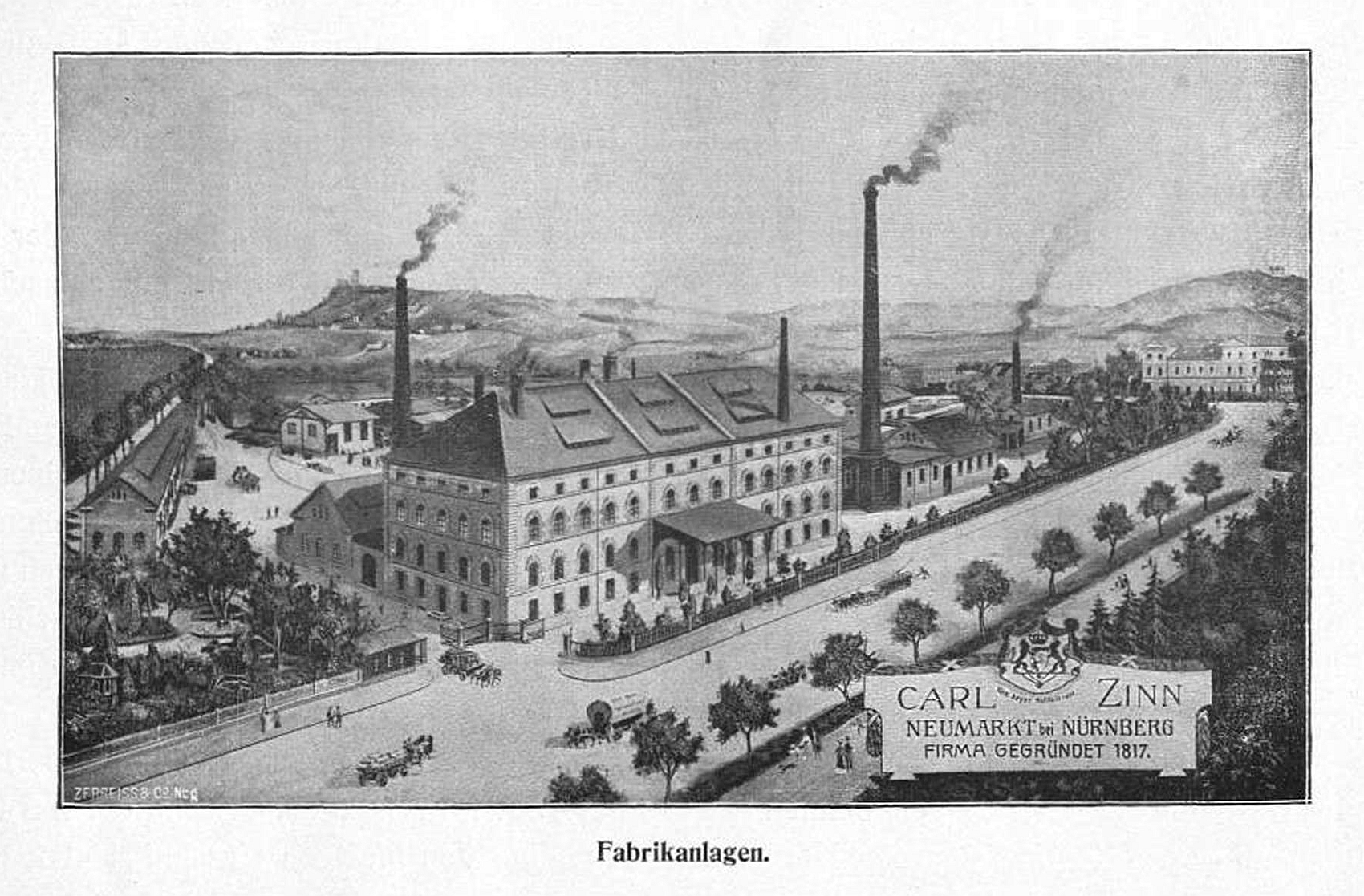 "Die Fabrikbetriebe der Firma Carl Zinn in Neumarkt i. Oberpfalz" - Zeichnung um 1900 - aus dem Buch "Die Industrie der Oberpfalz in Wort und Bild"